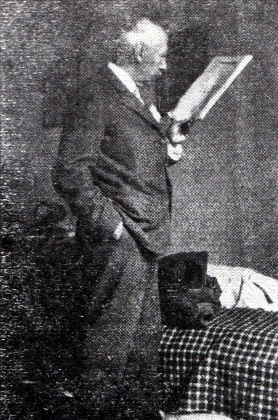 Gheorghe Petrașcu în curtea casei sale din București